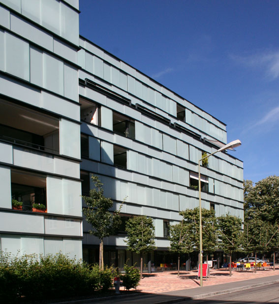 Housing Winterthur Baumschlager Eberle